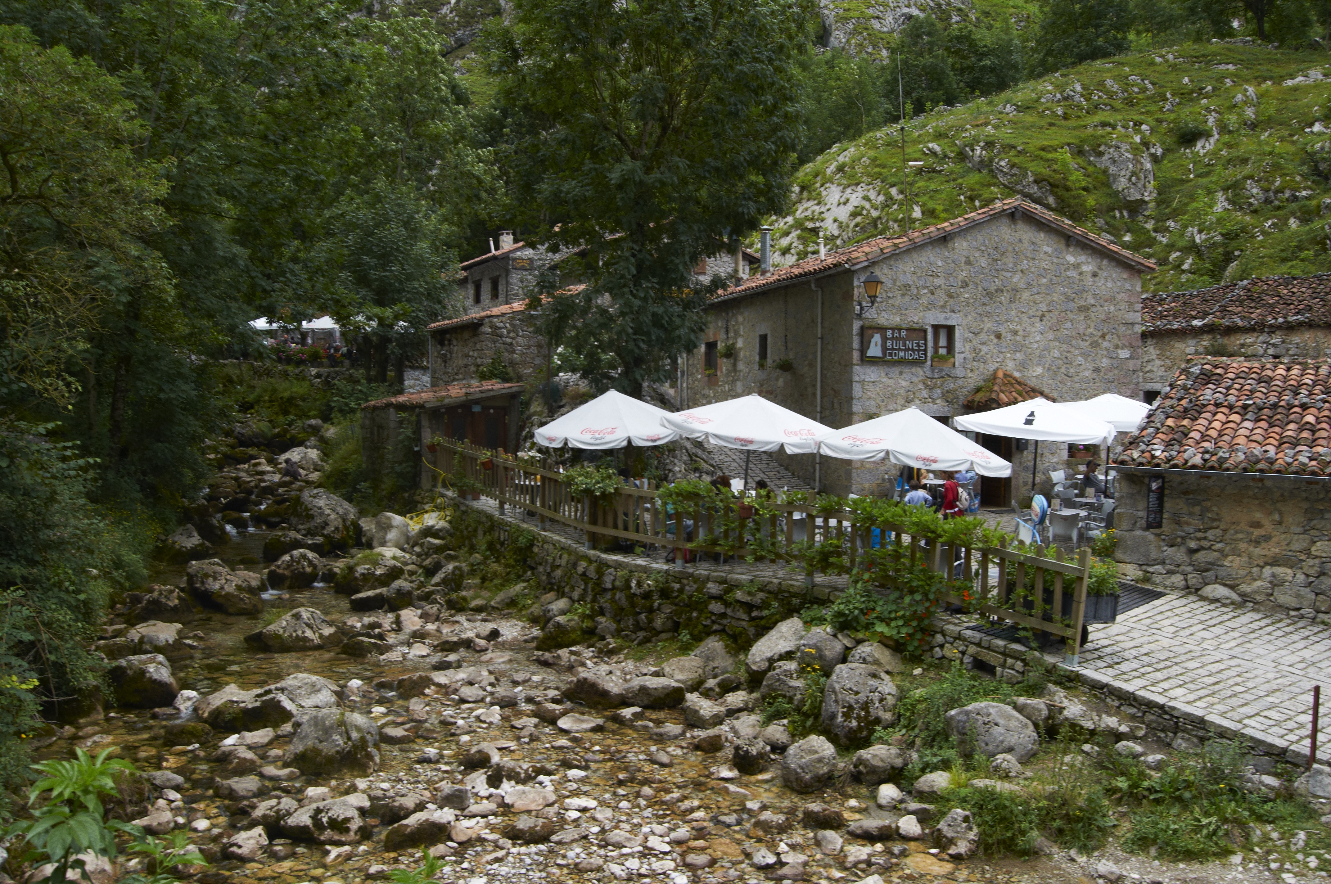 Rio